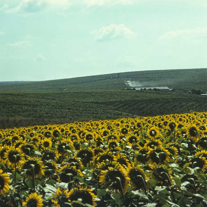 Near Anenii Noi (1972).